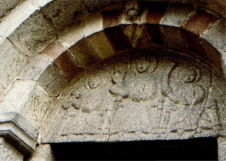 Munkbrarup Kirke i Sydslesvig. Sydportalens tympanon, Kristus mellem Peter og Paul